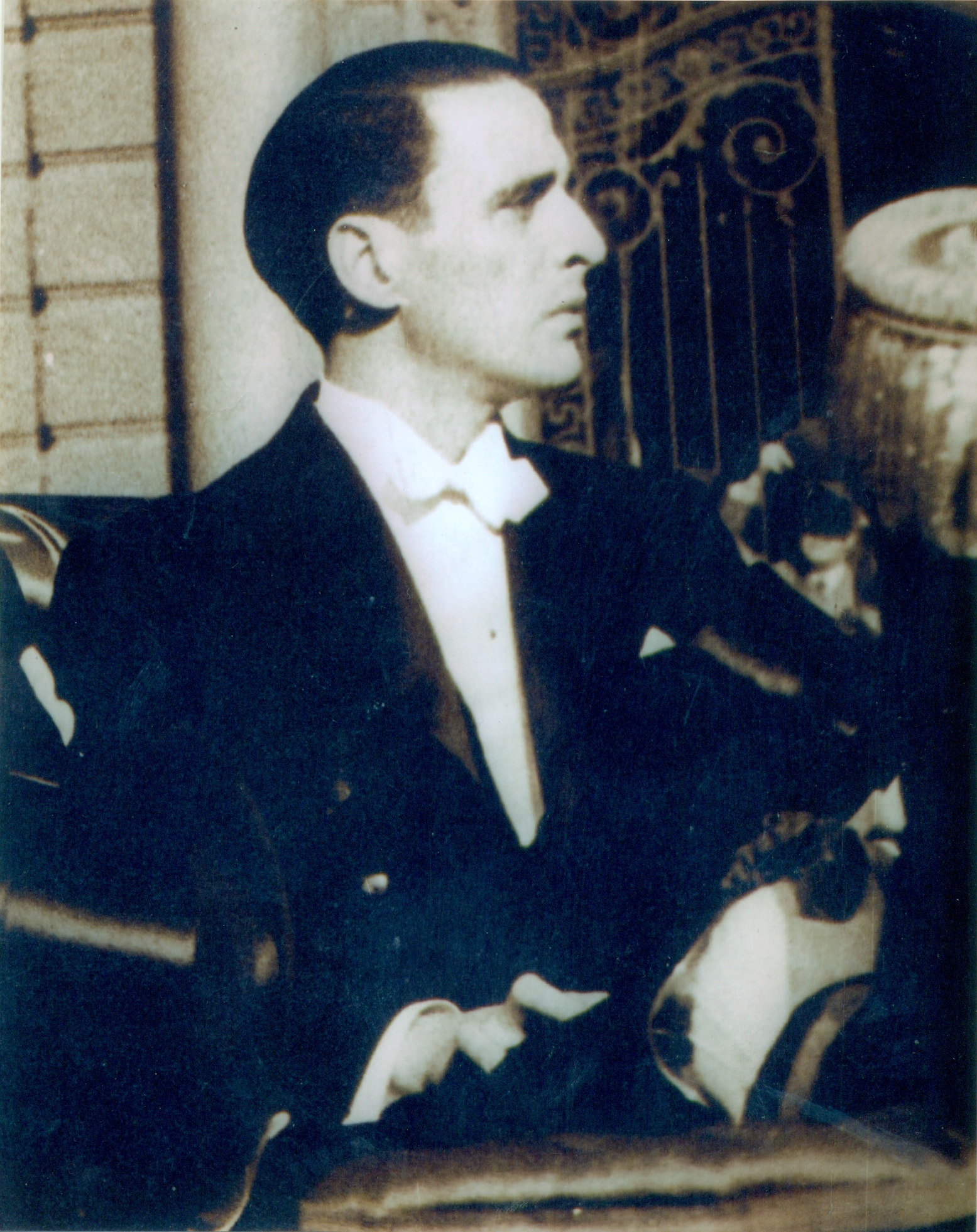 Raúl Morales Beltramí, como ministro del Interior del gobierno de Juan Antonio Ríos.